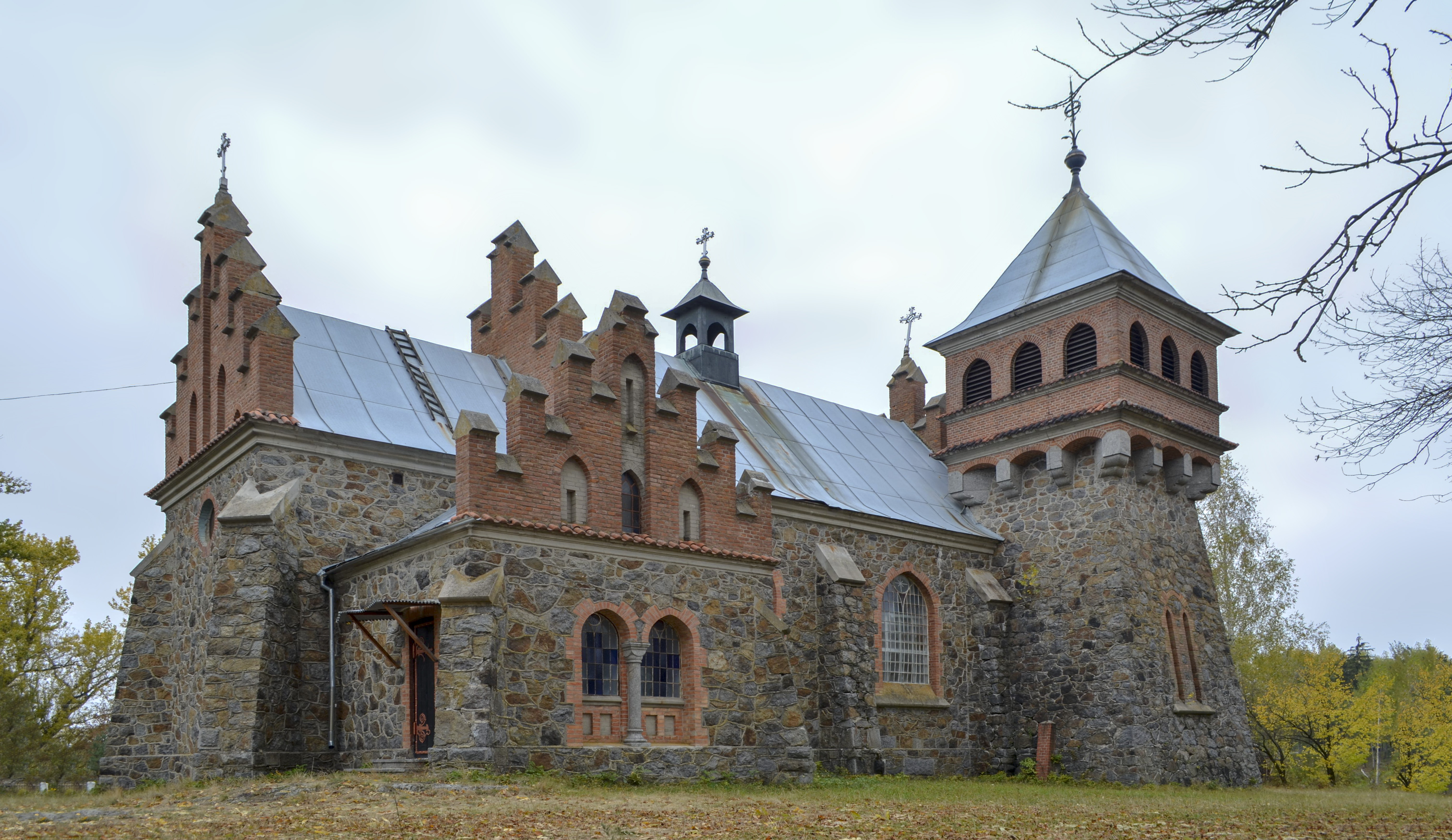 Костел Святої Клари, с. Городківка, вул. Шкільна, 40